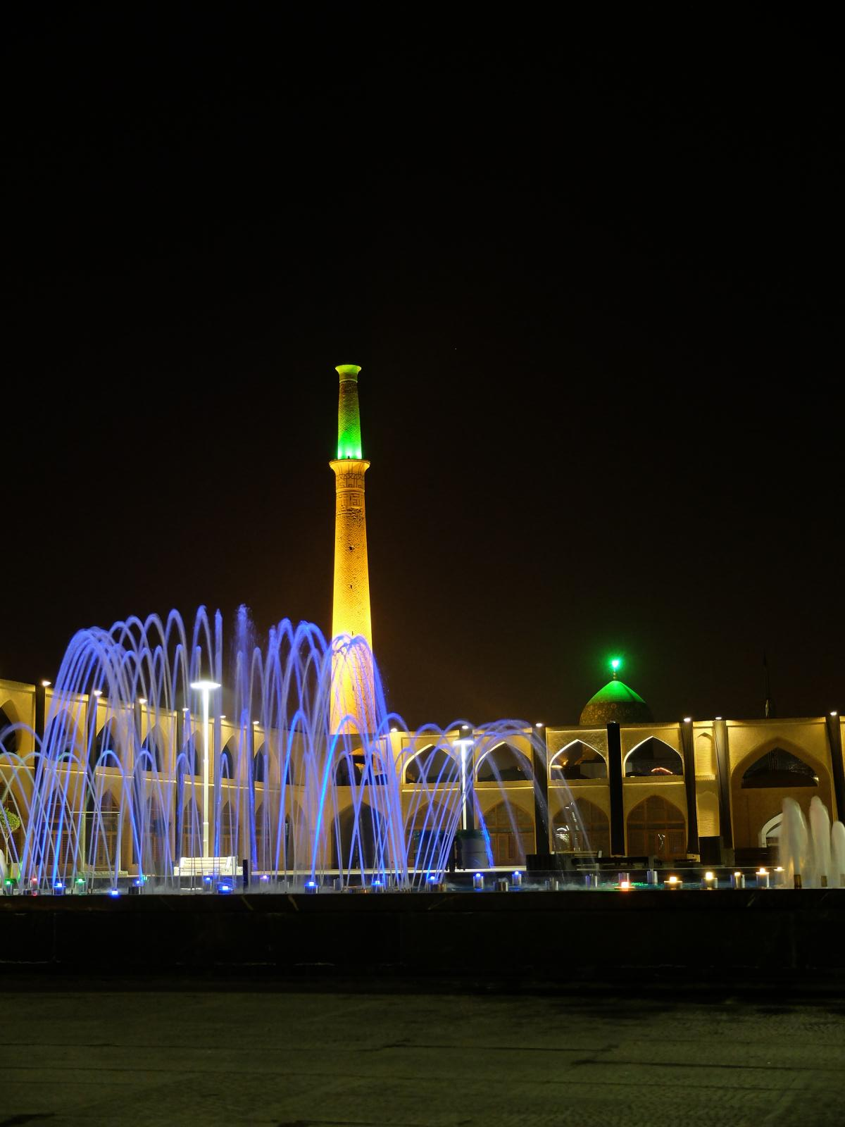 201312_iran_esfahan_19